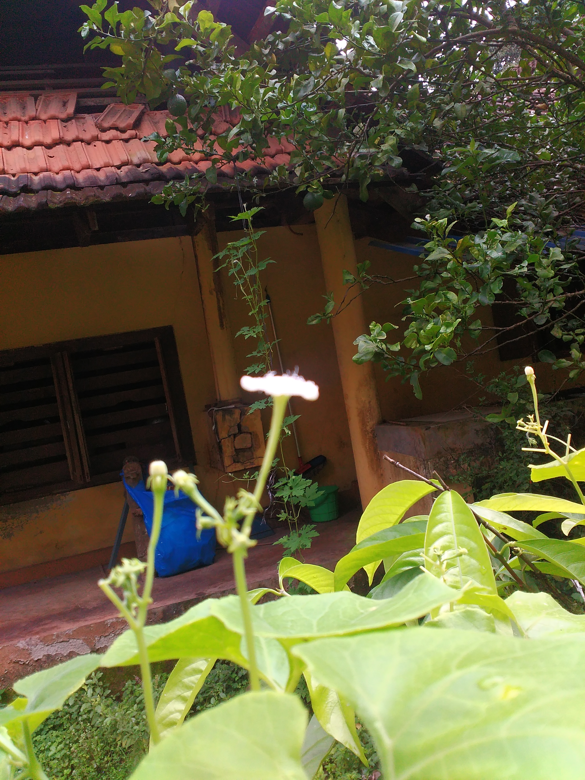 the flower of padola (Trichosanthes dioica) . a medicinal plant. foto Taken from Vellakkat mana